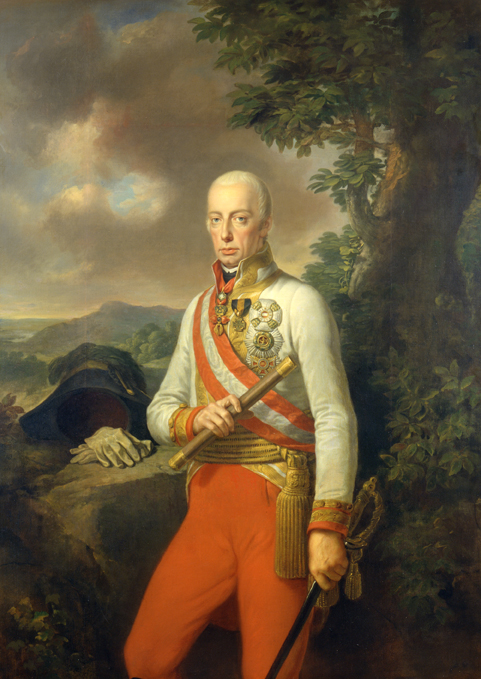 Porträt Kaiser Franz I. (1768-1835)